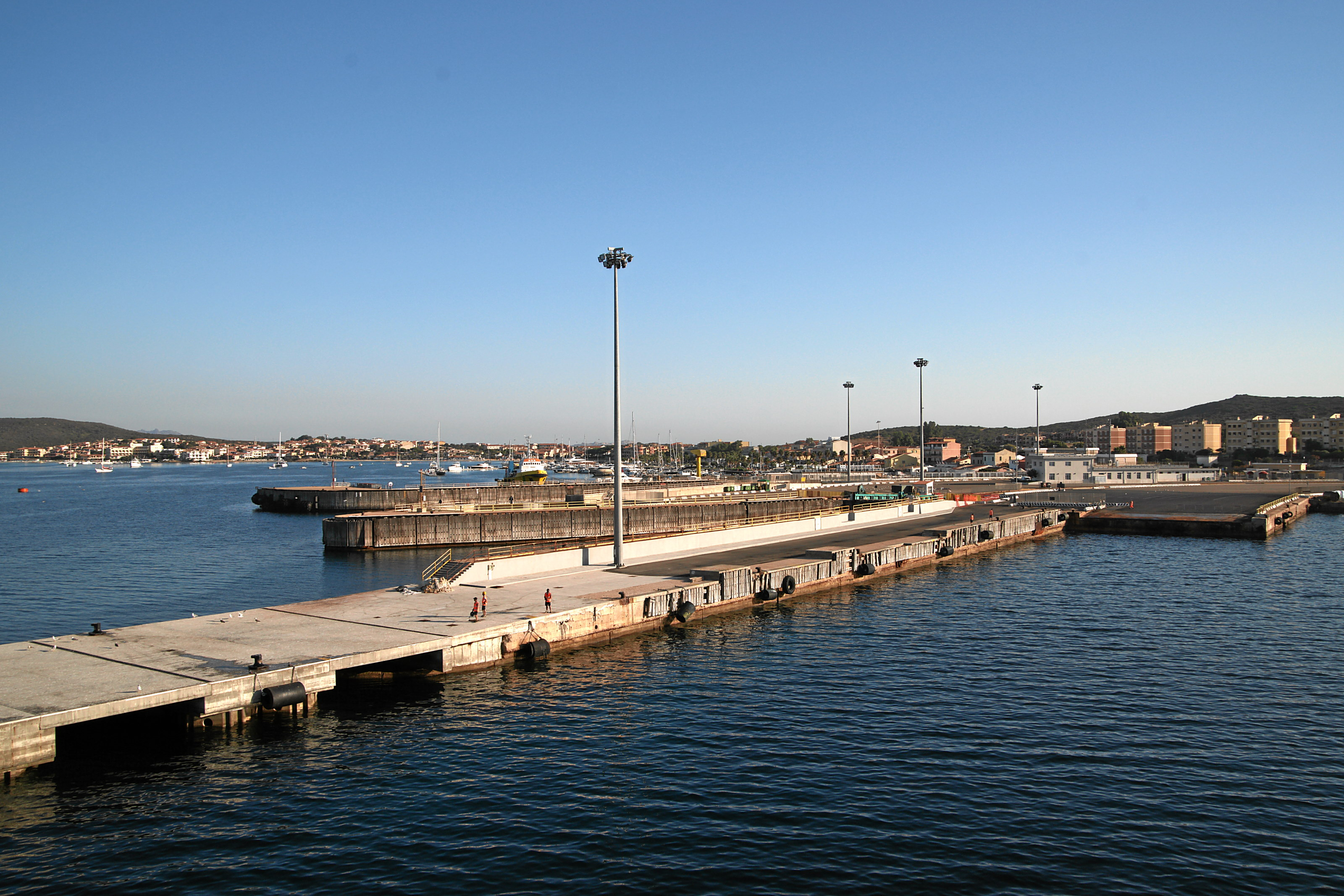 Golfo Aranci, Fährhafen